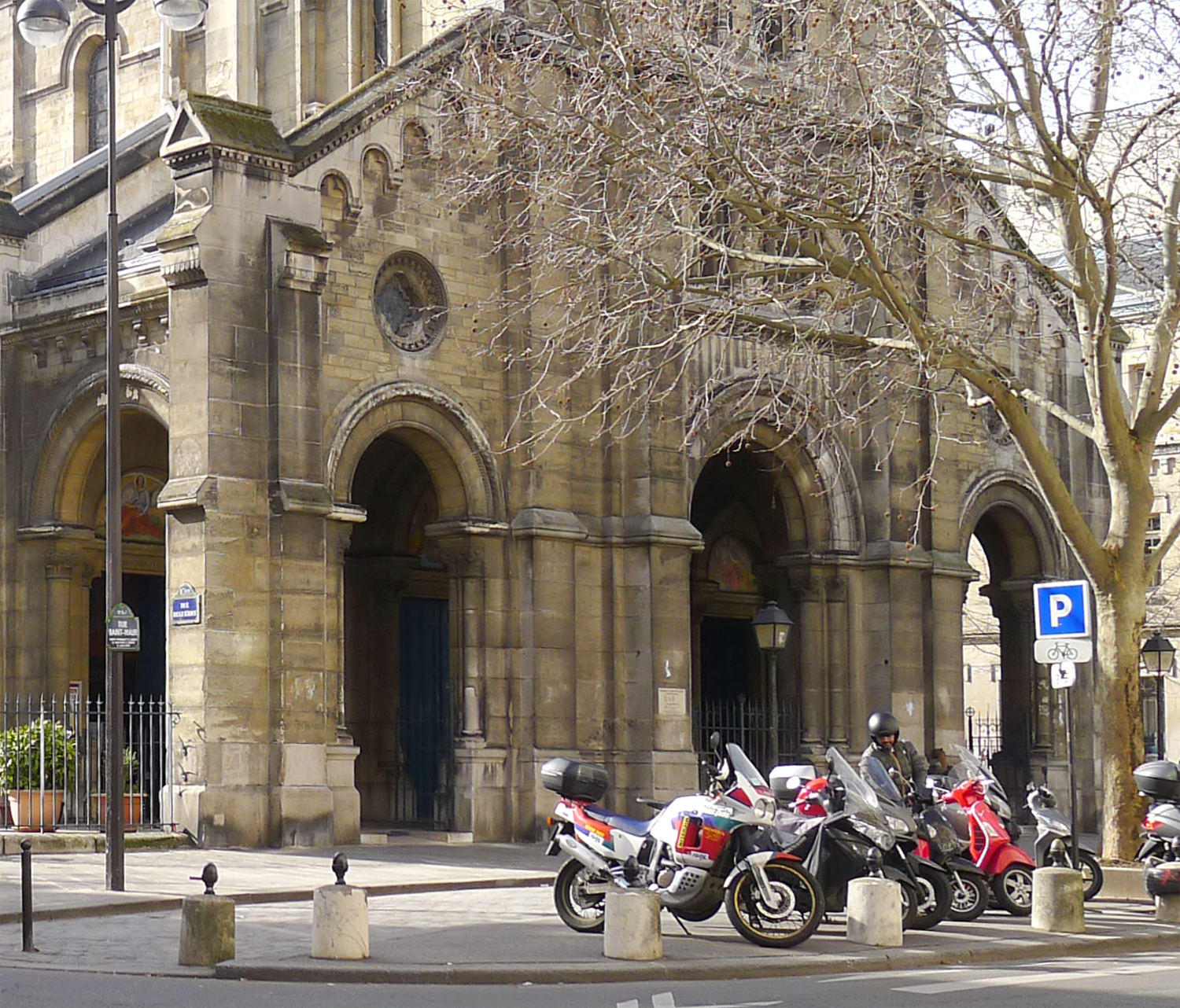 Église Saint-Joseph-des-Nations (porche d'entrée) - Paris XI